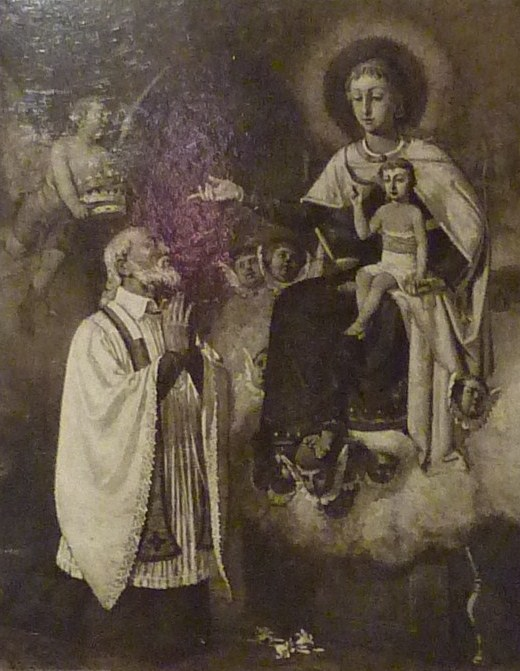 La très sainte Vierge apparaît à Michel Le Nobletz (à Agen alors qu'il était accusé d'avoir engrossé la femme de son logeur)